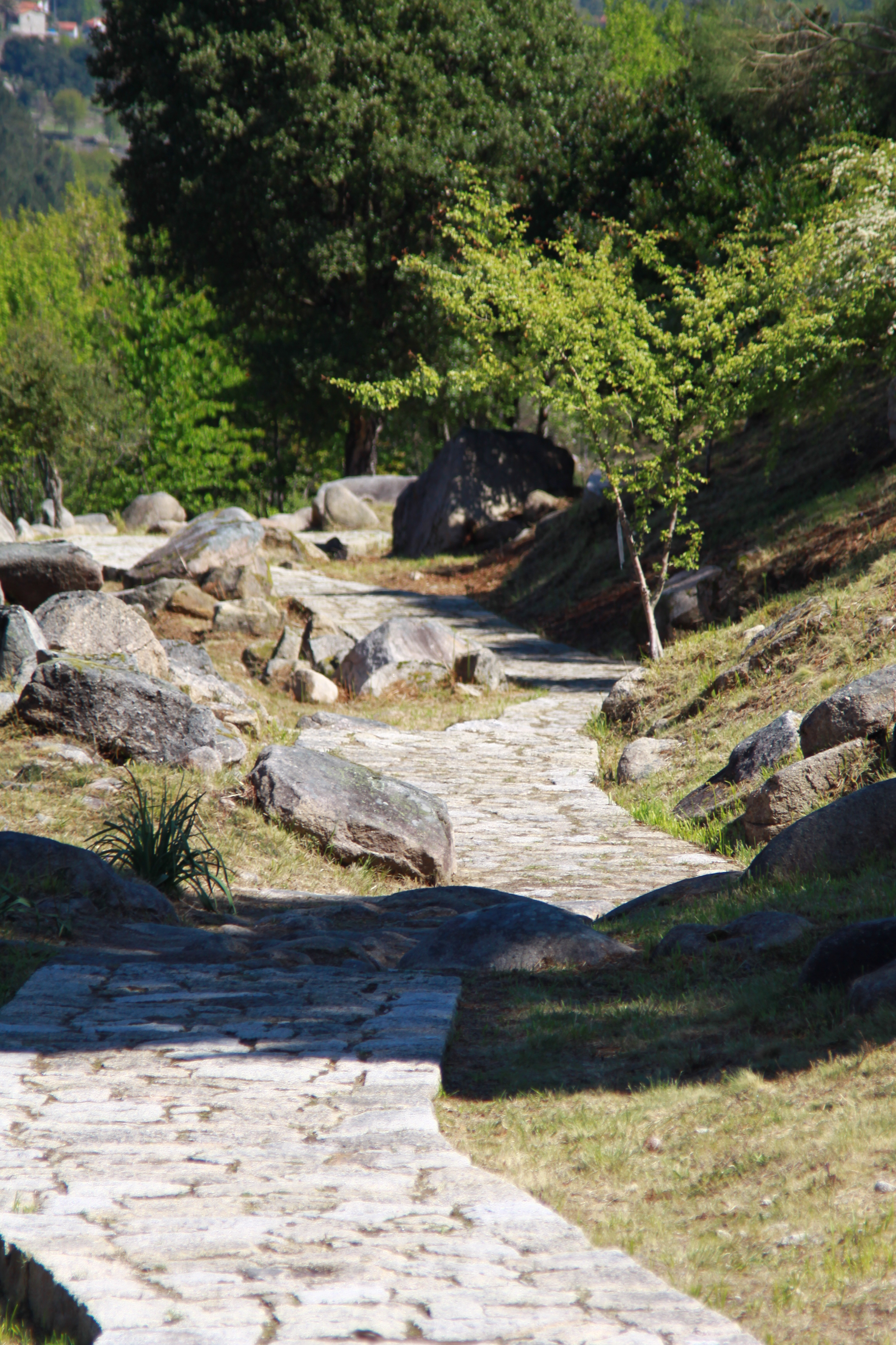 Vía XVIII, A Pontenova, Lobios